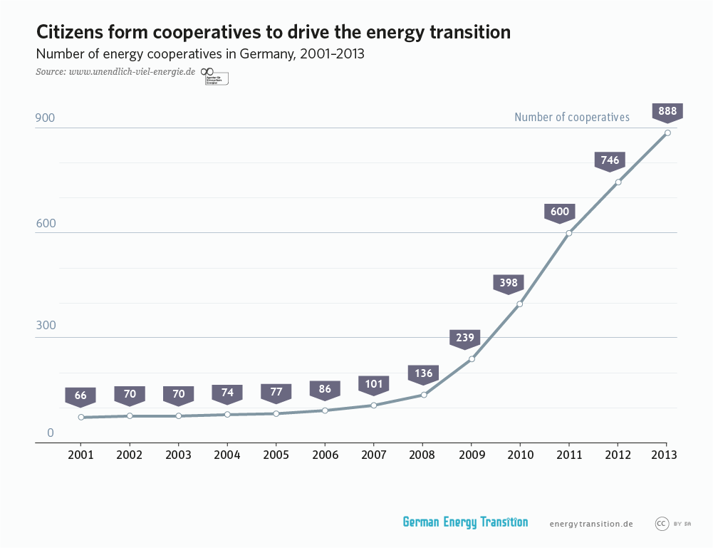 Wachstum der Bürgerenergiegenossenschaften in Deutschland